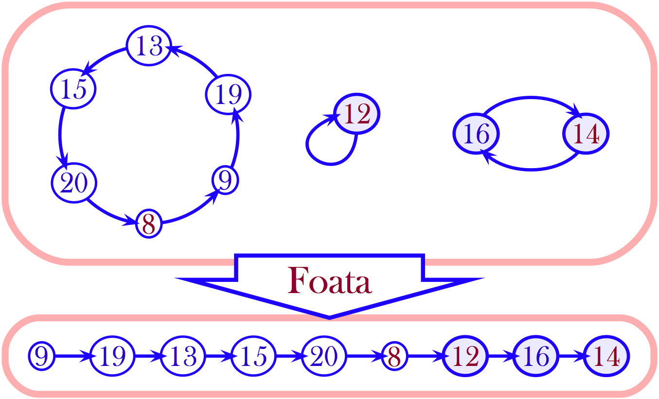 Correspondance fondamentale de Foata, version généralisée à un ensemble quelconque d'entiers (plutôt qu'à [ [ 1 , n ] ] {\displaystyle [\![1,n]\!]\ } ), en vue de définir la bijection de Joyal